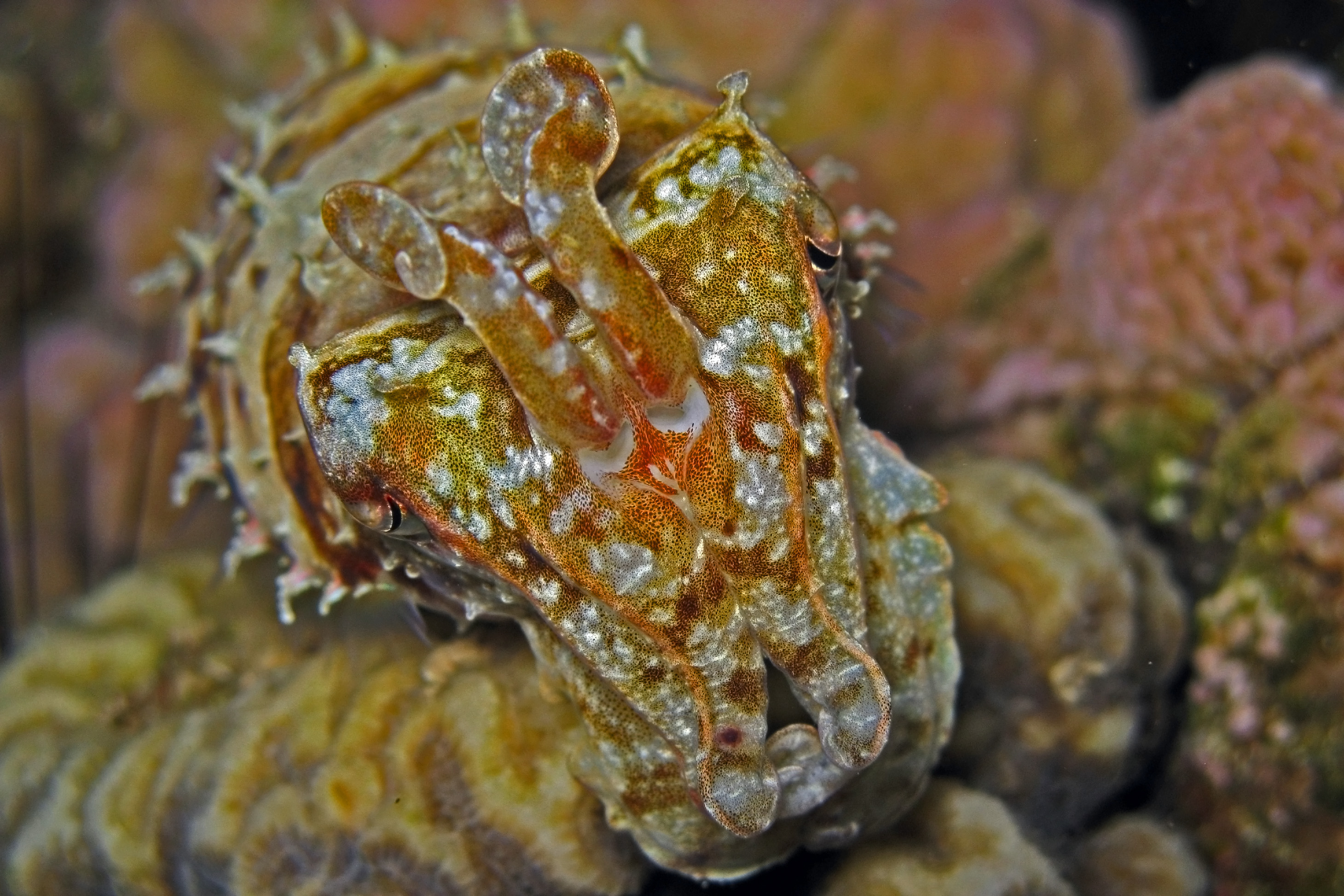 Cuttlefish - Sepia prashadi; Egypt-Sinai-Dahab